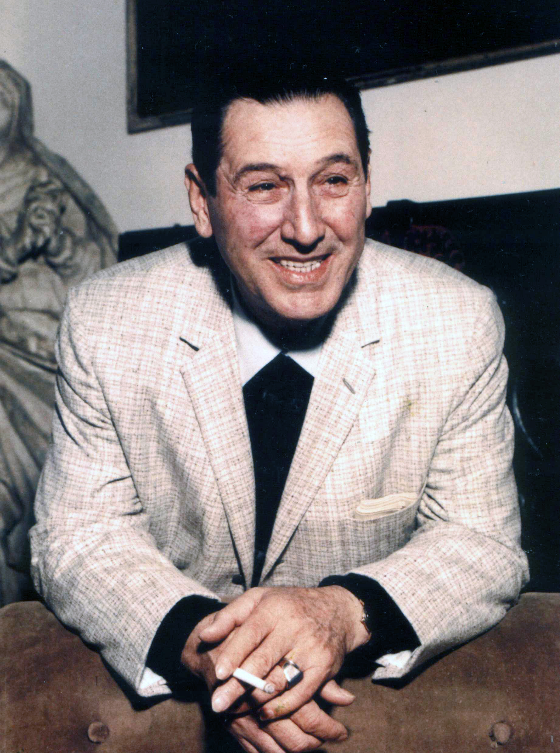 Presidente Juan Domingo Perón, retratado en 1973. Archivo General de la Nación